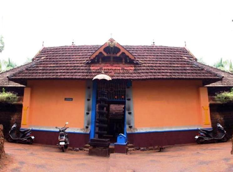 കിള്ളിക്കുറിശ്ശിമംഗലം പടിഞ്ഞാറേ ക്ഷേത്ര ഗോപുരം